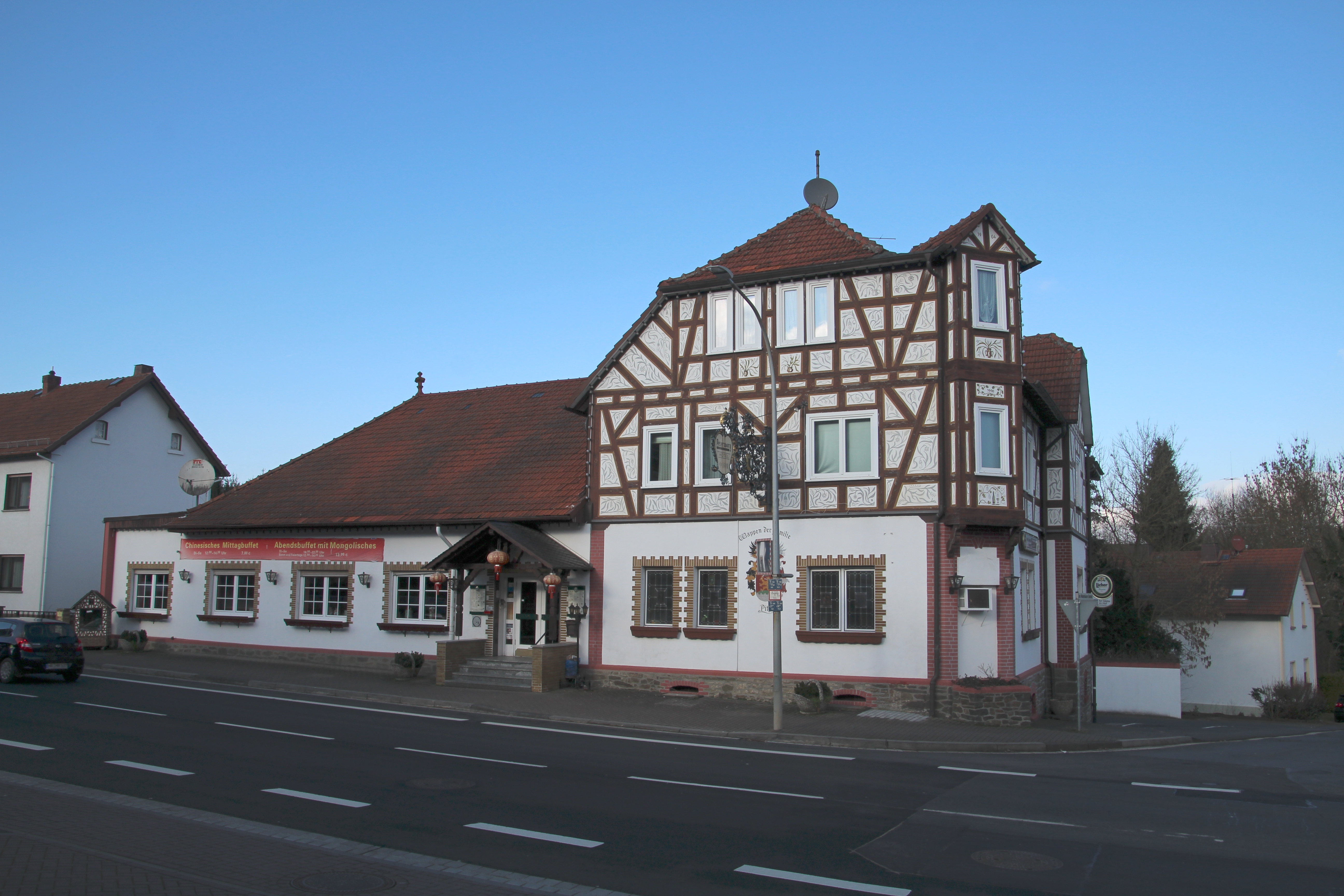 Petersburg in Weidenhausen